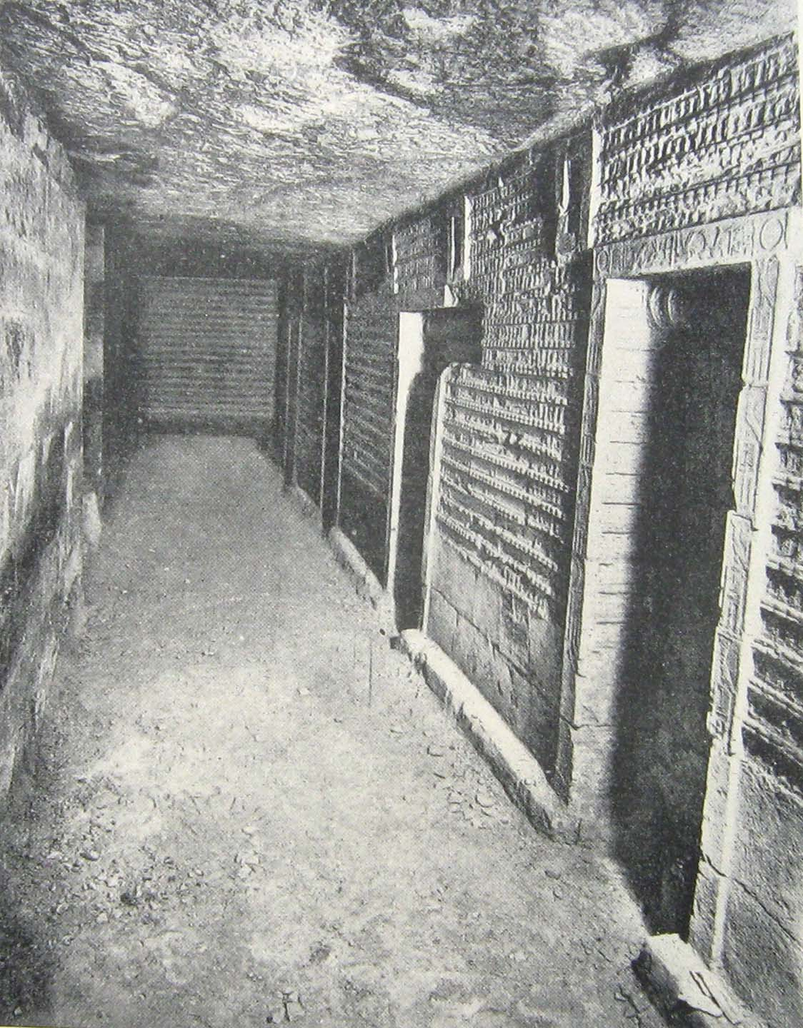 Photo de la galerie bleue de la tombe sud du complexe de Djoser